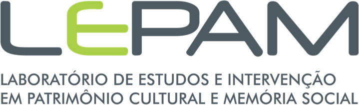 Logomarca institucional LEPAM.